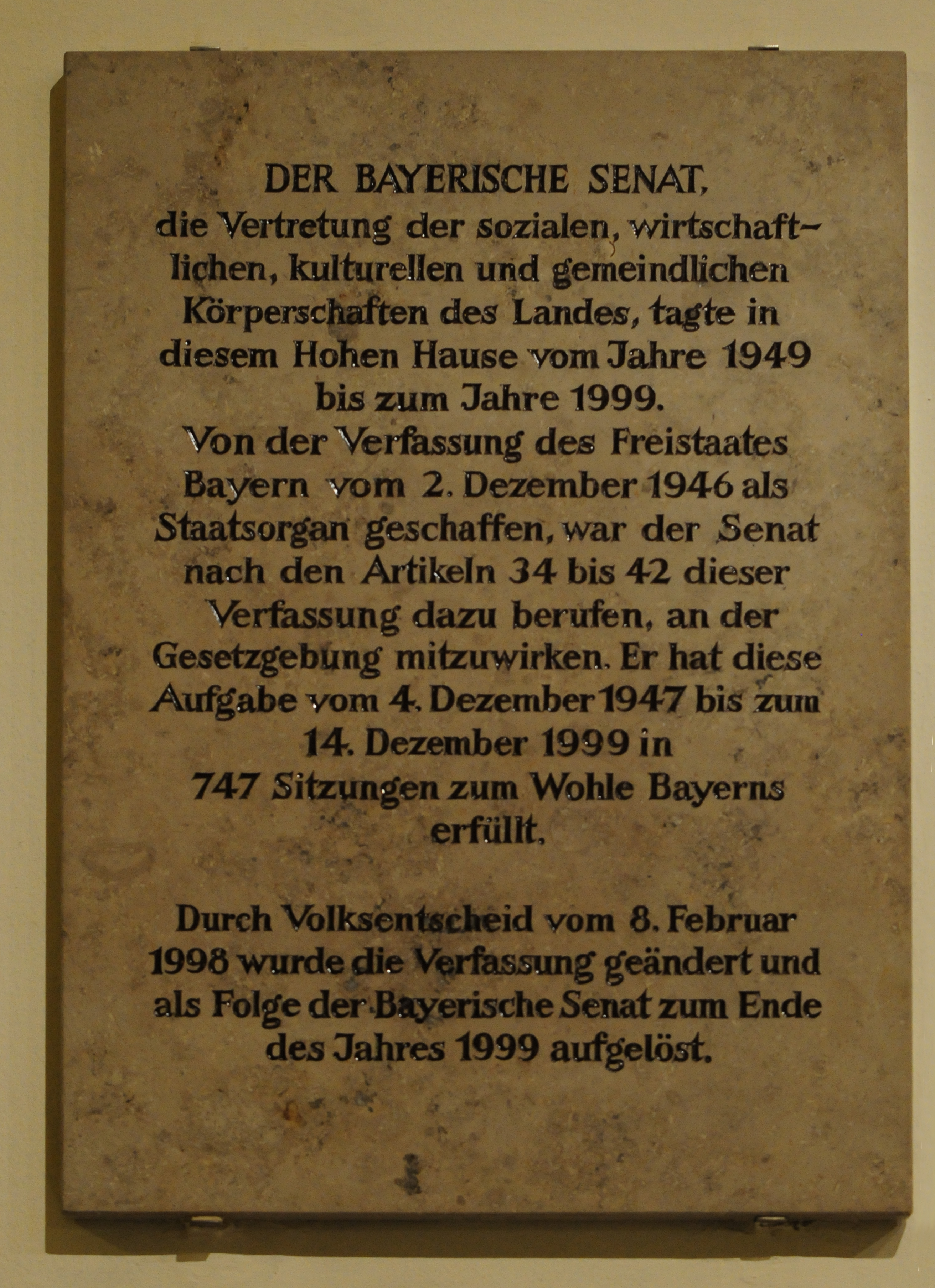 Landtagsprojekt Bayern The making of this document was supported by Wikimedia Austria. Wikipedia im Landtag – Bayern 17. bis 19. Juli 2012 in München Dieses Foto wurde im Rahmen des Projektes „Wikipedia im Landtag“ erstellt.